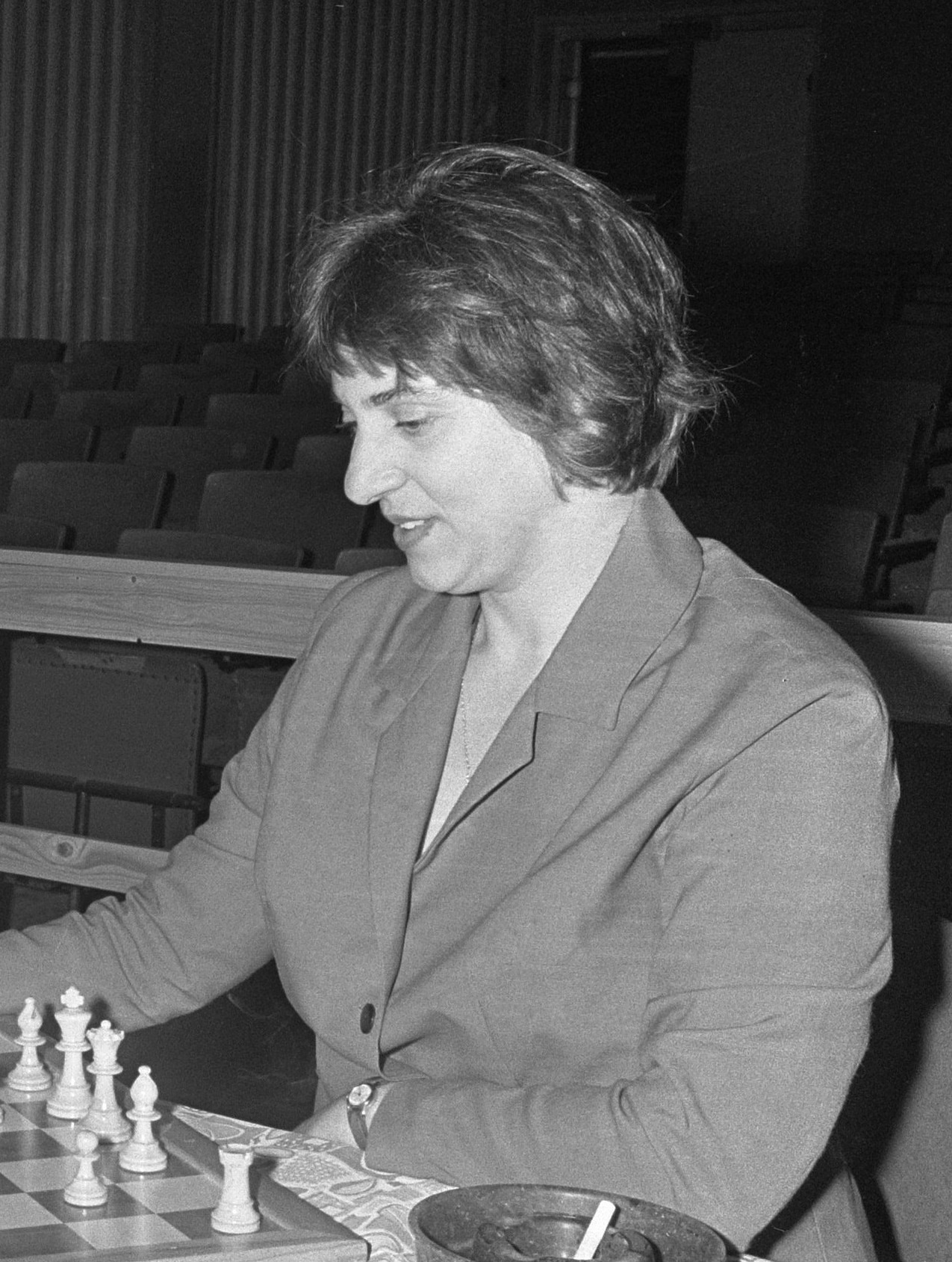 28e Hoogoven schaaktoernooi van start, Donner oefende even met mevrouw Bobotsov (Antonia Ivanova)